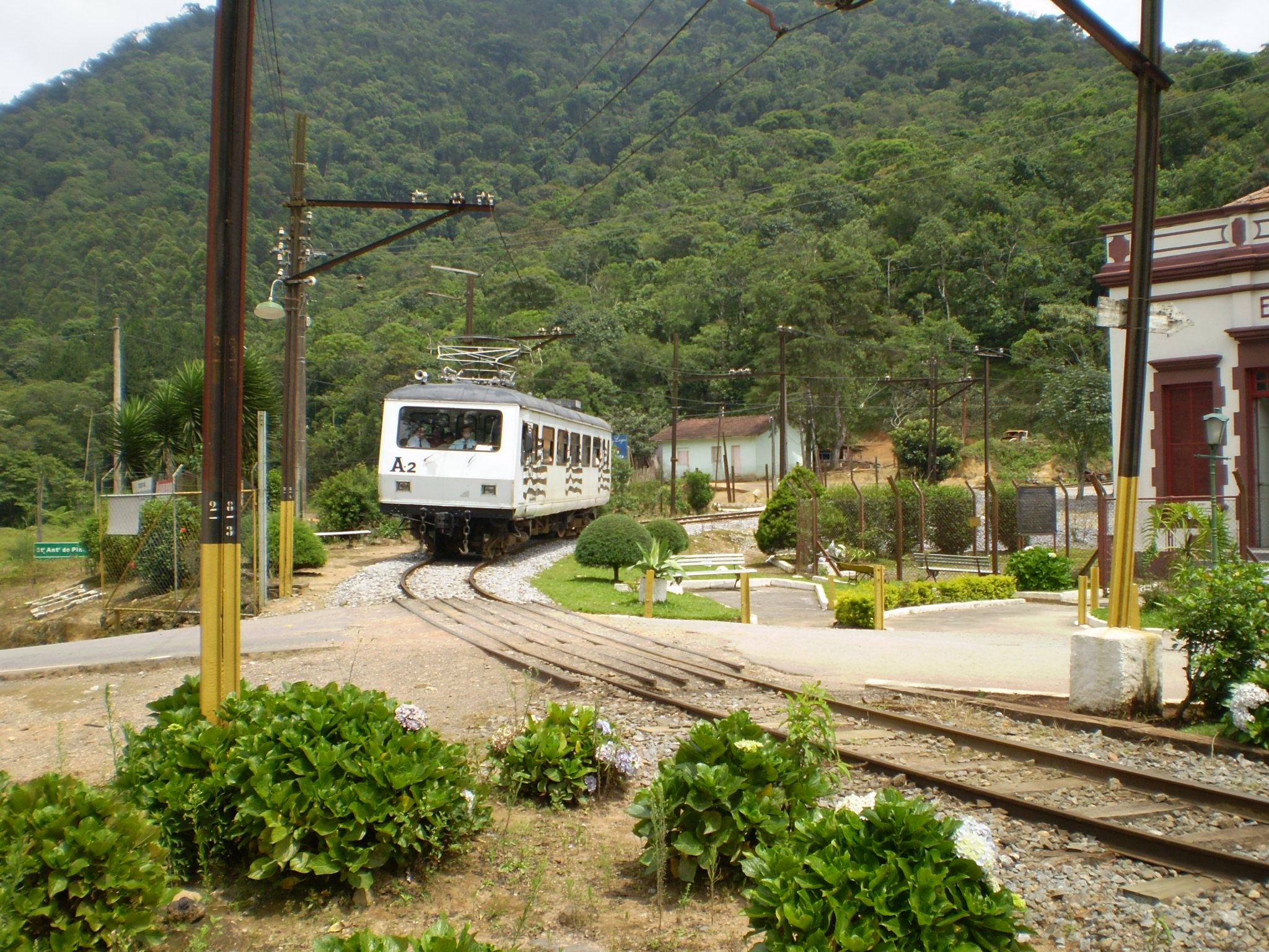 Trem da Estrada de Ferro Campos do Jordão, Chegando em Santo Antonio do Pinhal.JPG